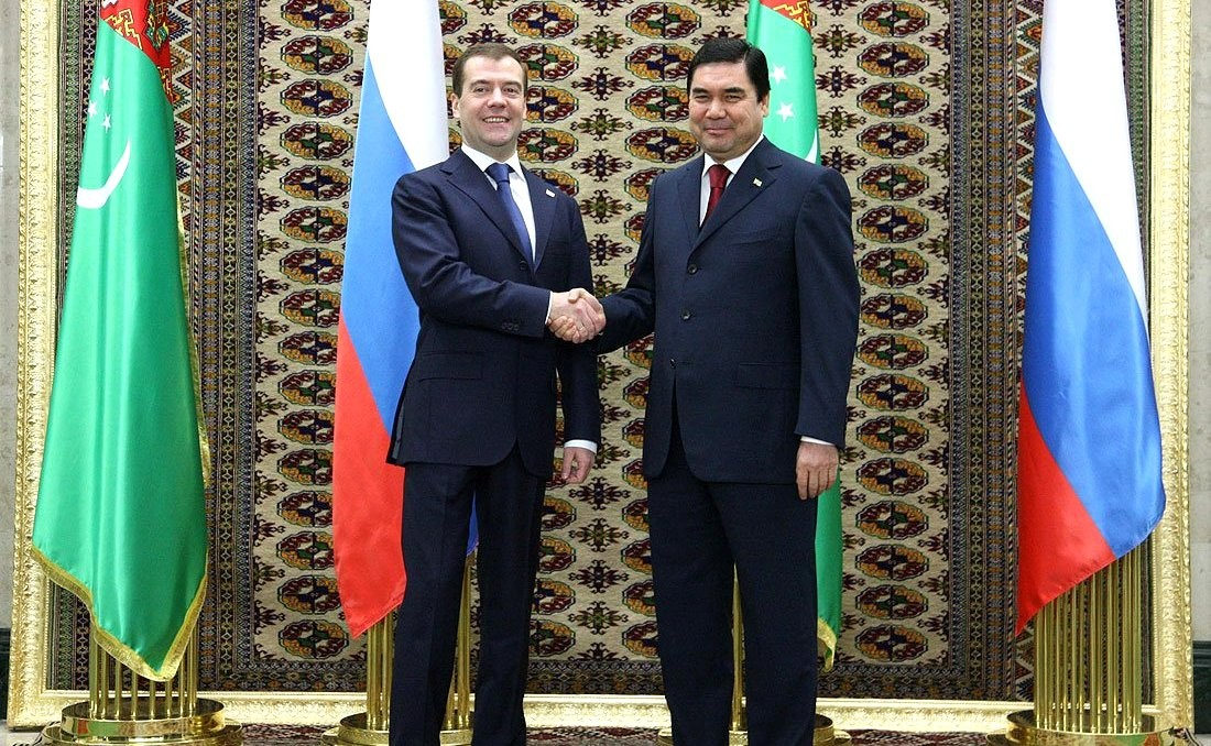 С Президентом Туркменистана Гурбангулы Бердымухамедовым.